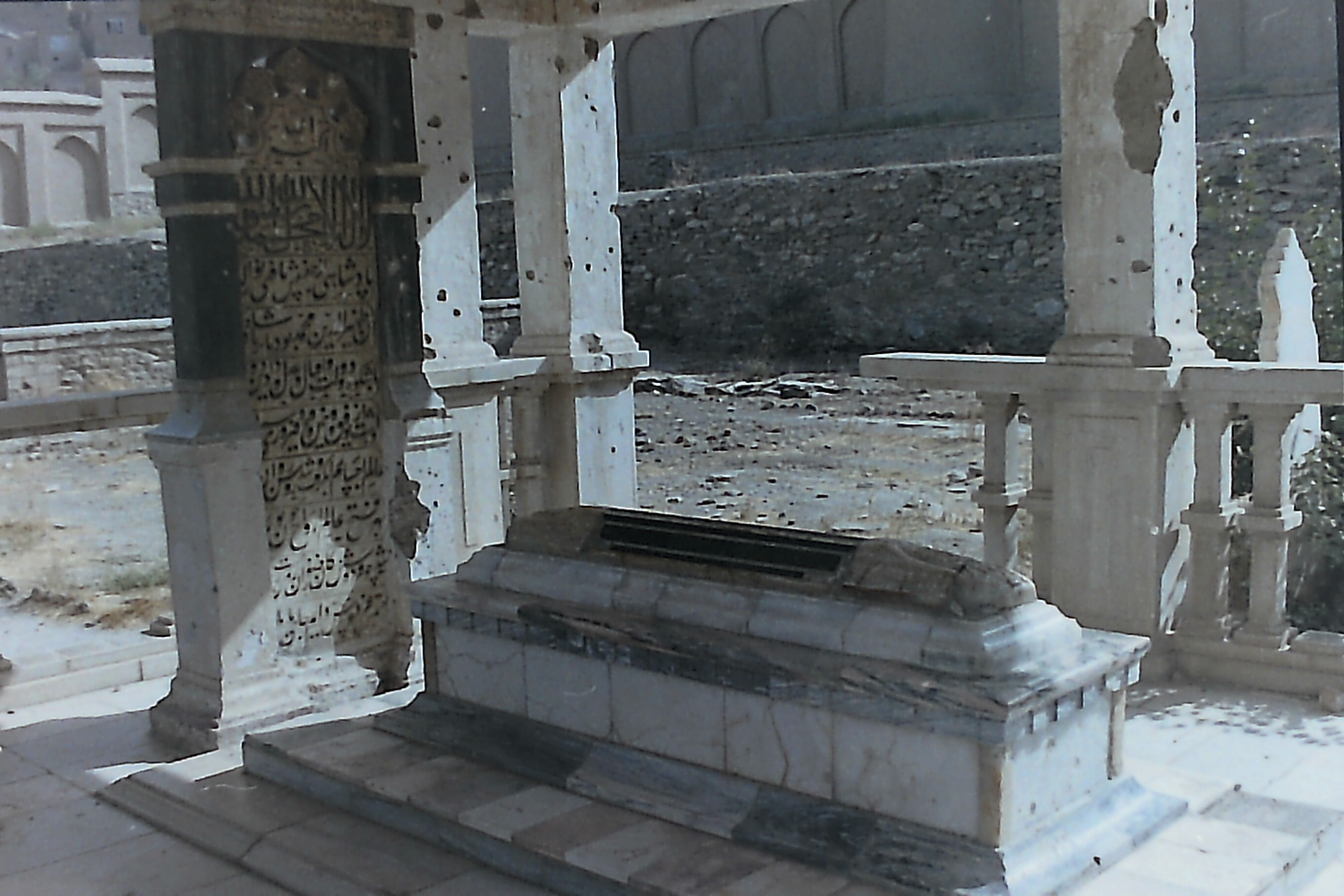 アフガニスタンの首都カブールにあるムガル帝国初代バーブルの墓 2003年8月に訪問した際に撮影（フィルムスキャナーでネガをデジタル画像化）